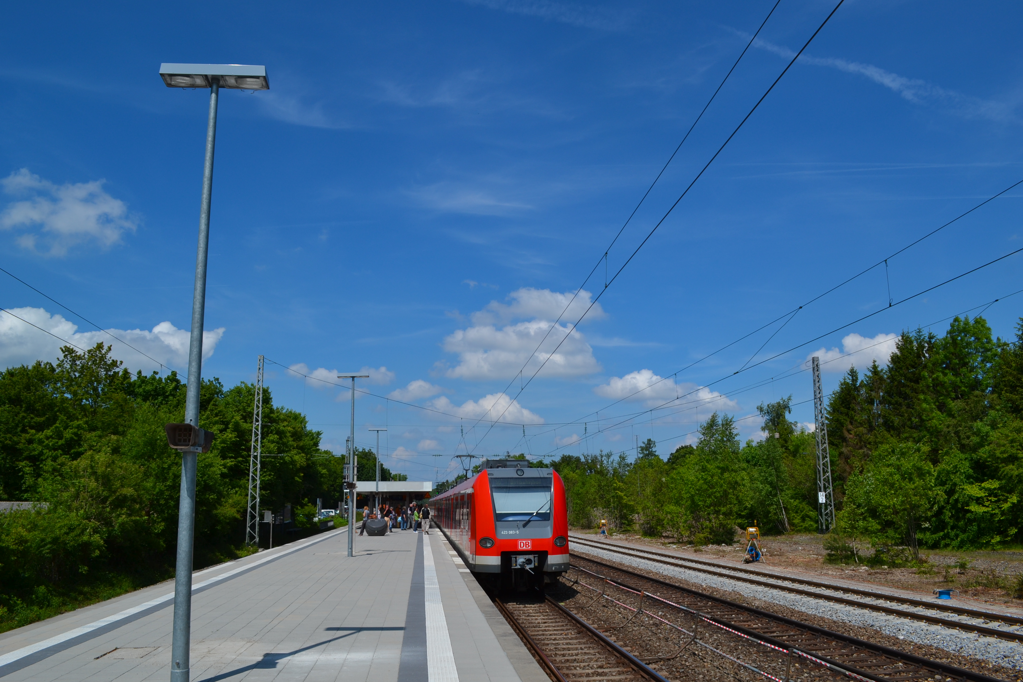 Planegg S-Bahn állomása